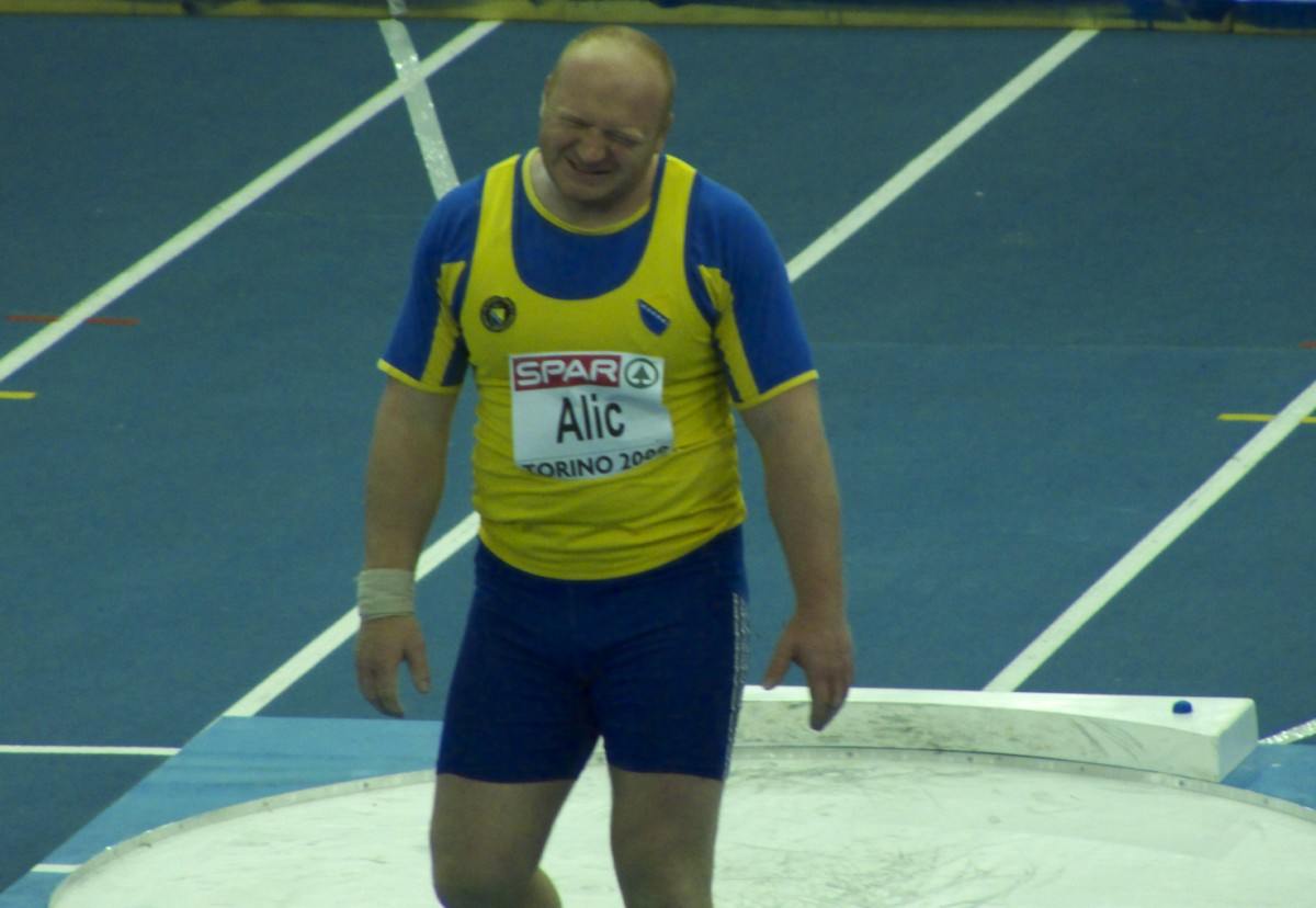 Hamza Alic ai campionati europei di Torino 2009